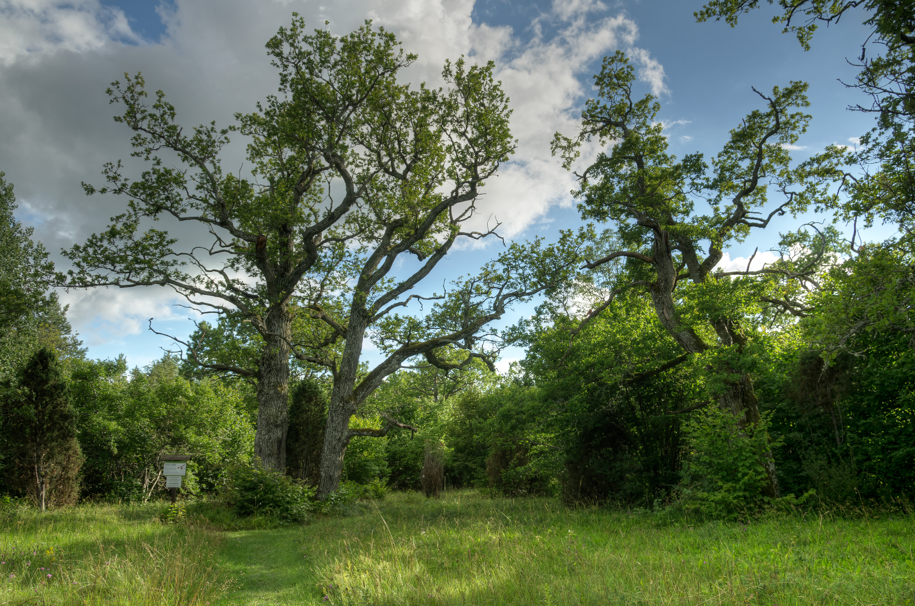 Loode Tammik Saaremaal. Aavikute tammed (oletatav vanus 450-500 aastat).